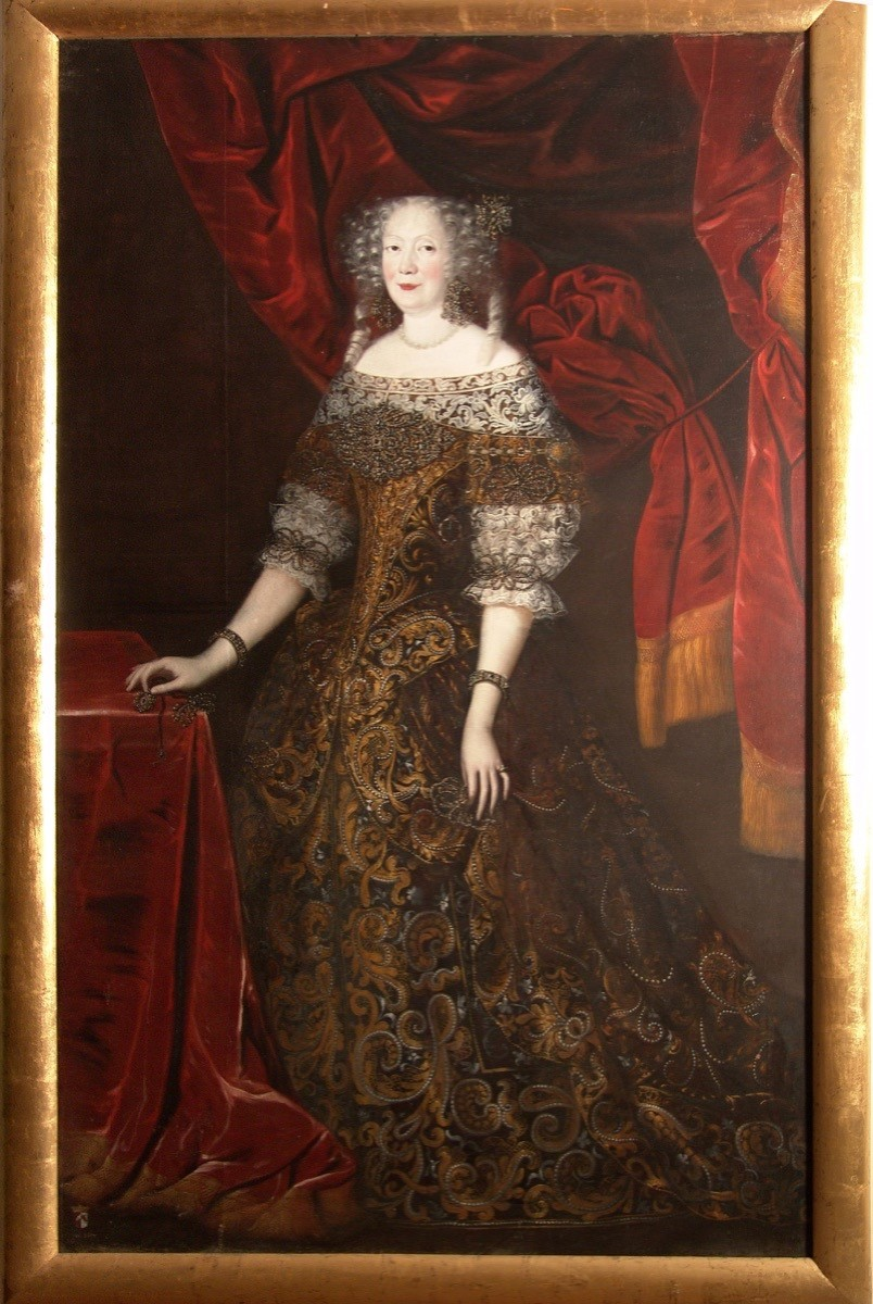 Ludmila Eva Františka hraběnka Kolowrat-Krakowská, rozená Hiserlová z Chodova